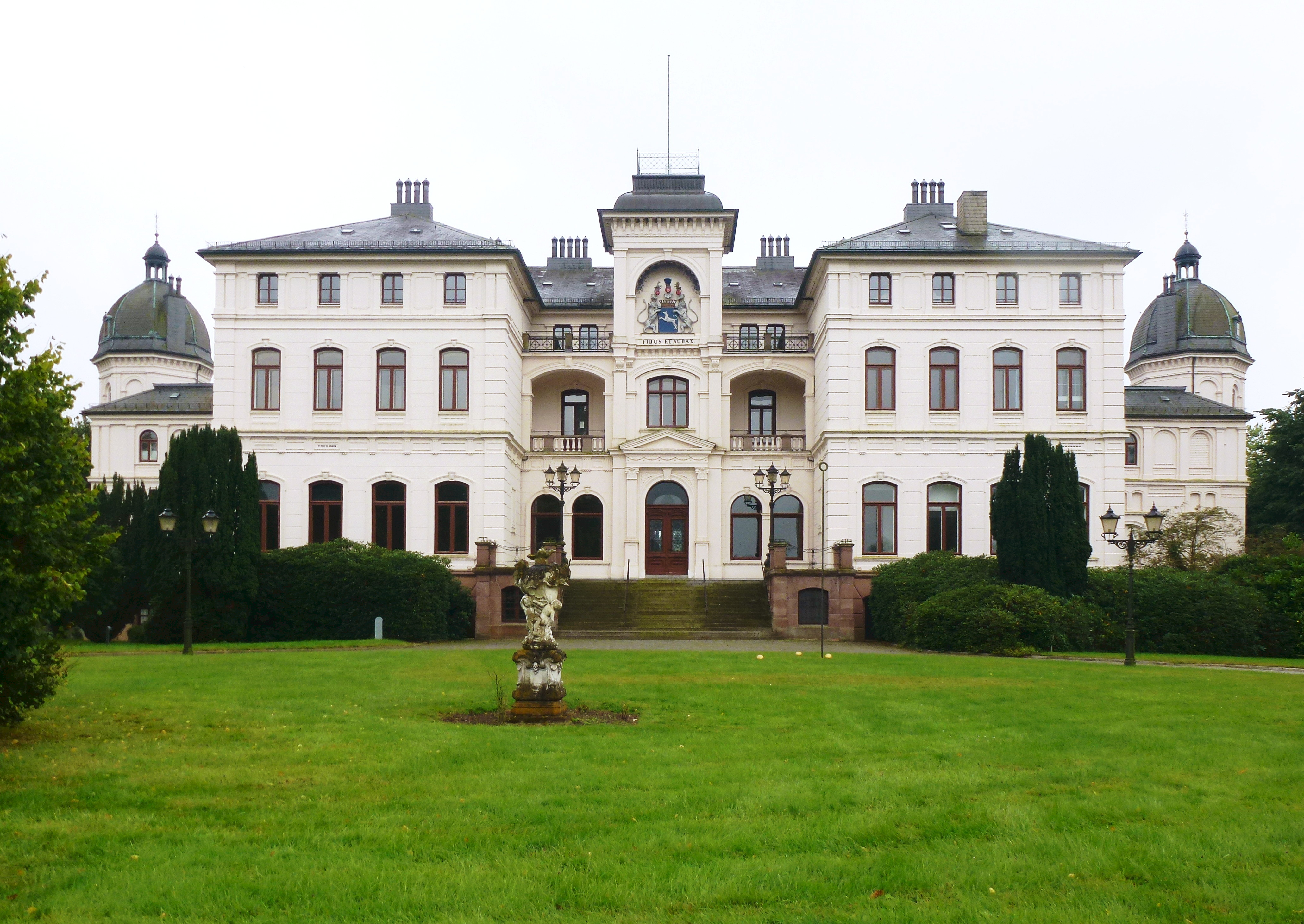 Gut Salzau